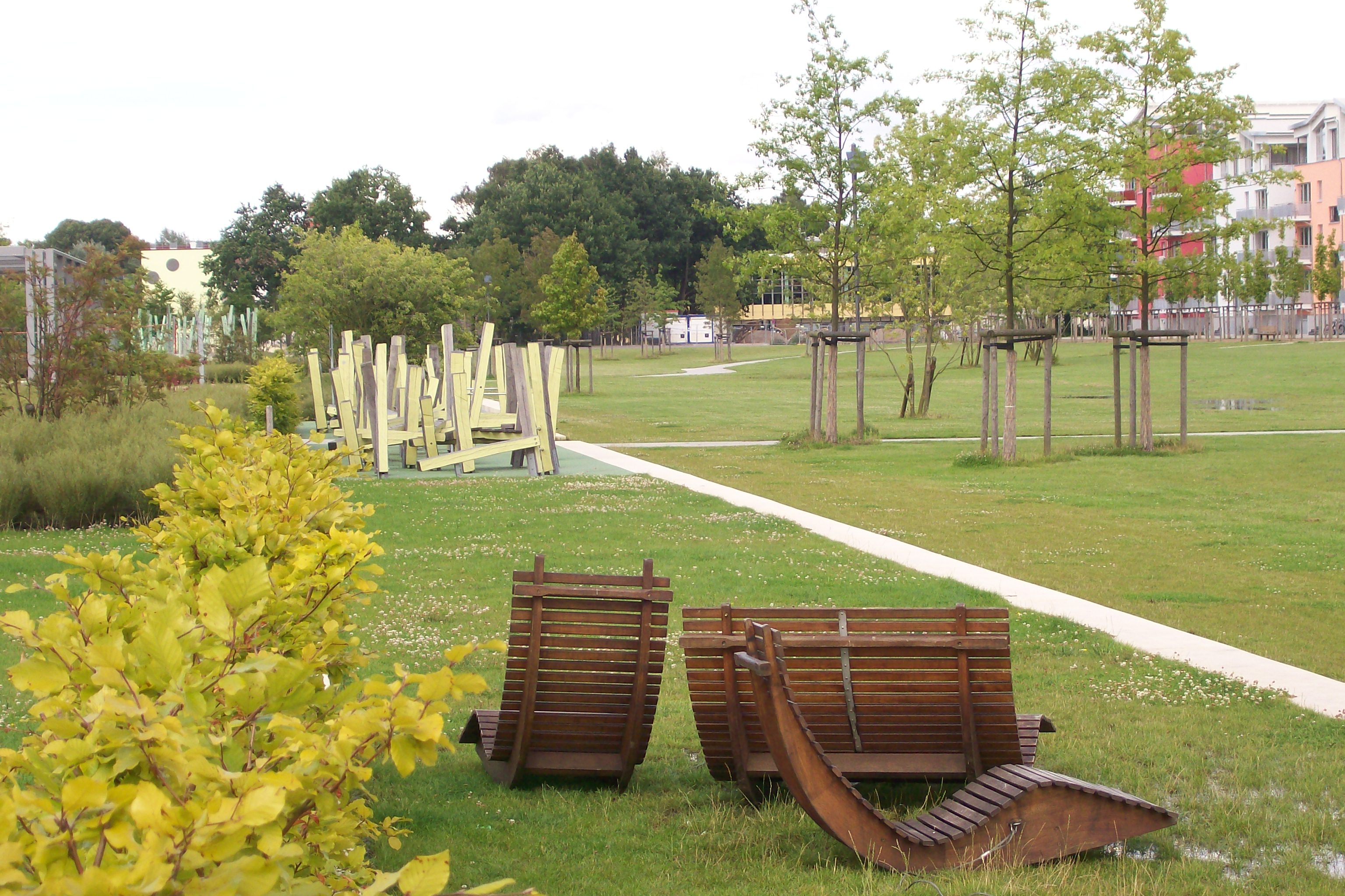 Carlebachpark in Hochschulstadtteil in Lübeck named after the rabbi family descending from Lübeck